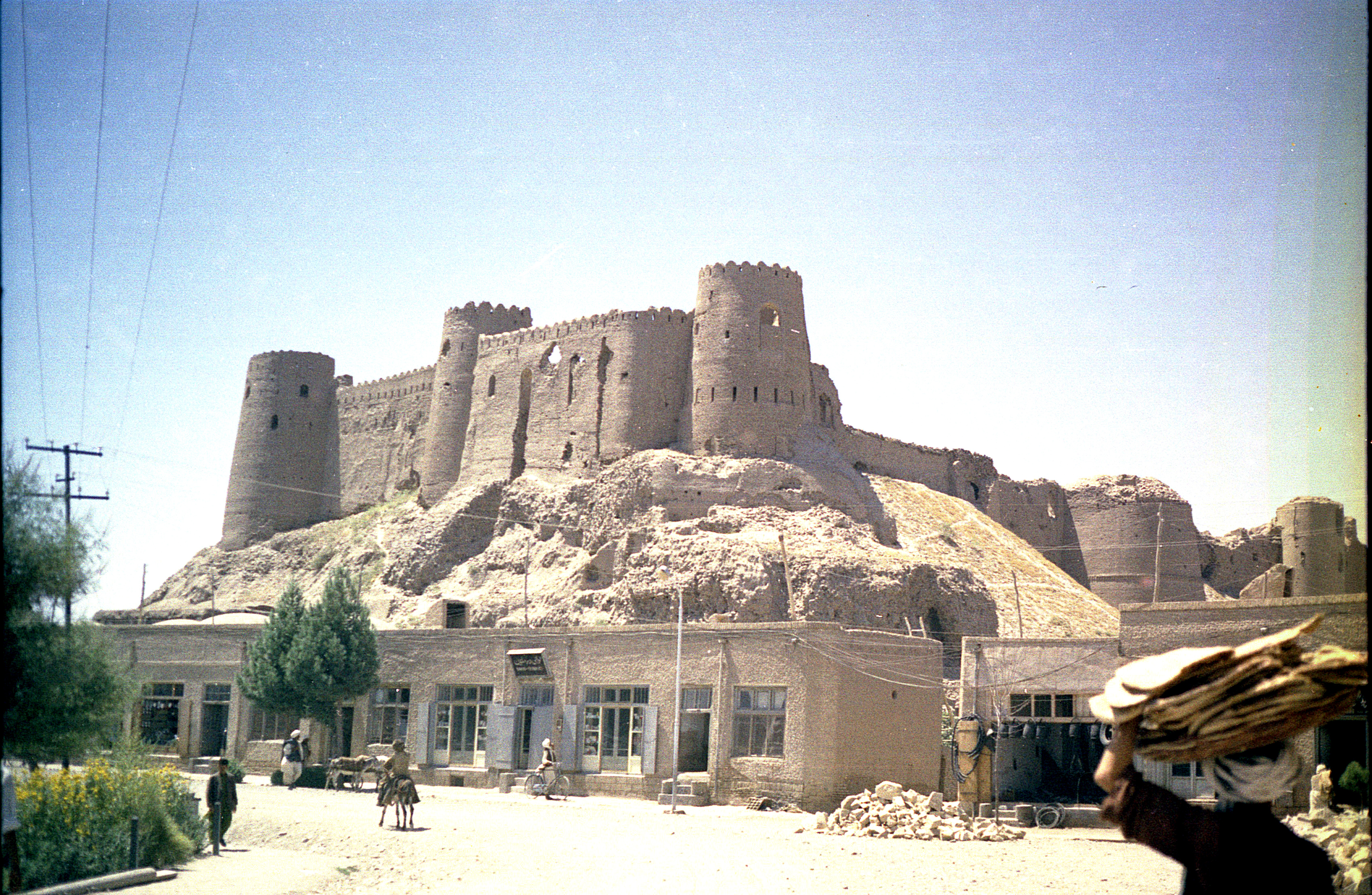 Afghanistan, Herat, la citadelle en 1969